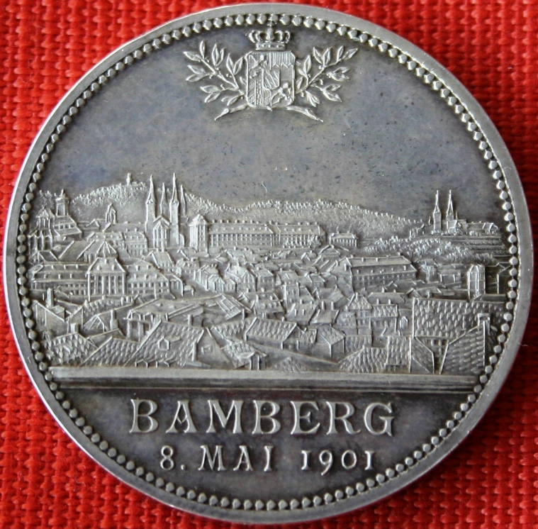 Medaille zur Geburt des Prinzen Luitpold von Bayern, 8.5.1901